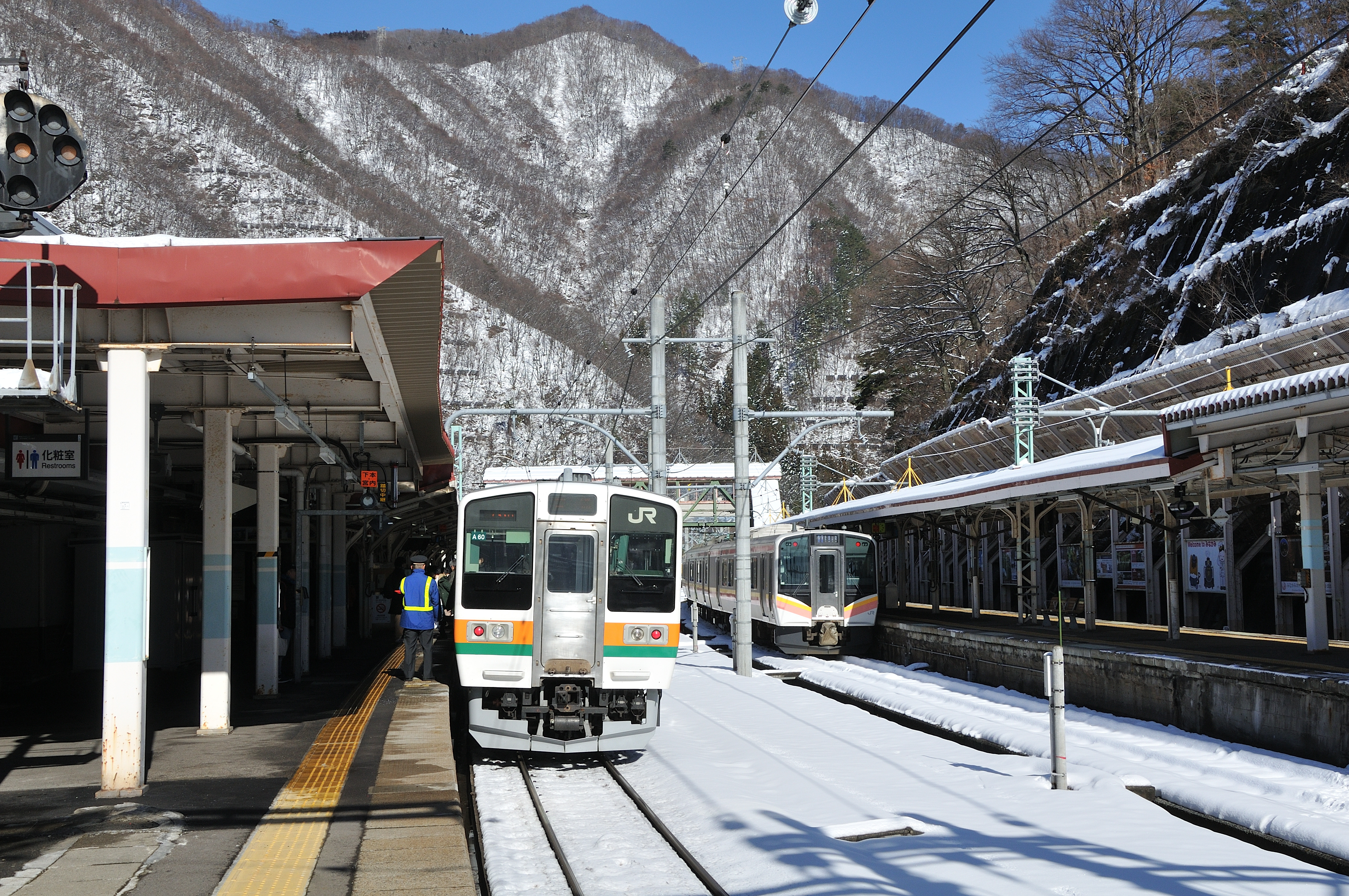 水上駅に停車中の高崎方面からの211系と新潟方面からの129系。水上駅で運転系統が分かれる。